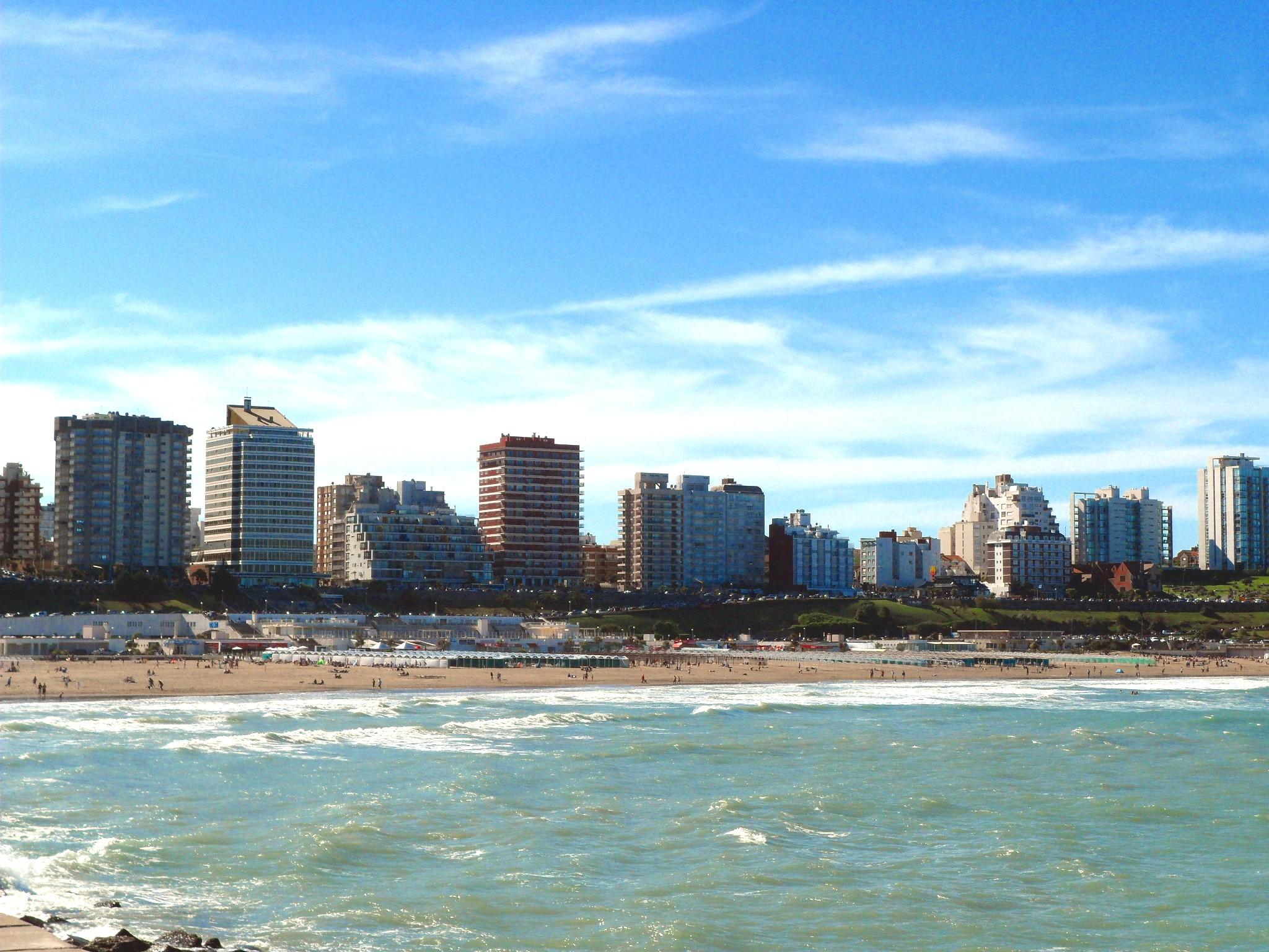 panoramica de Playa grande y Parque San Martin desde el puerto